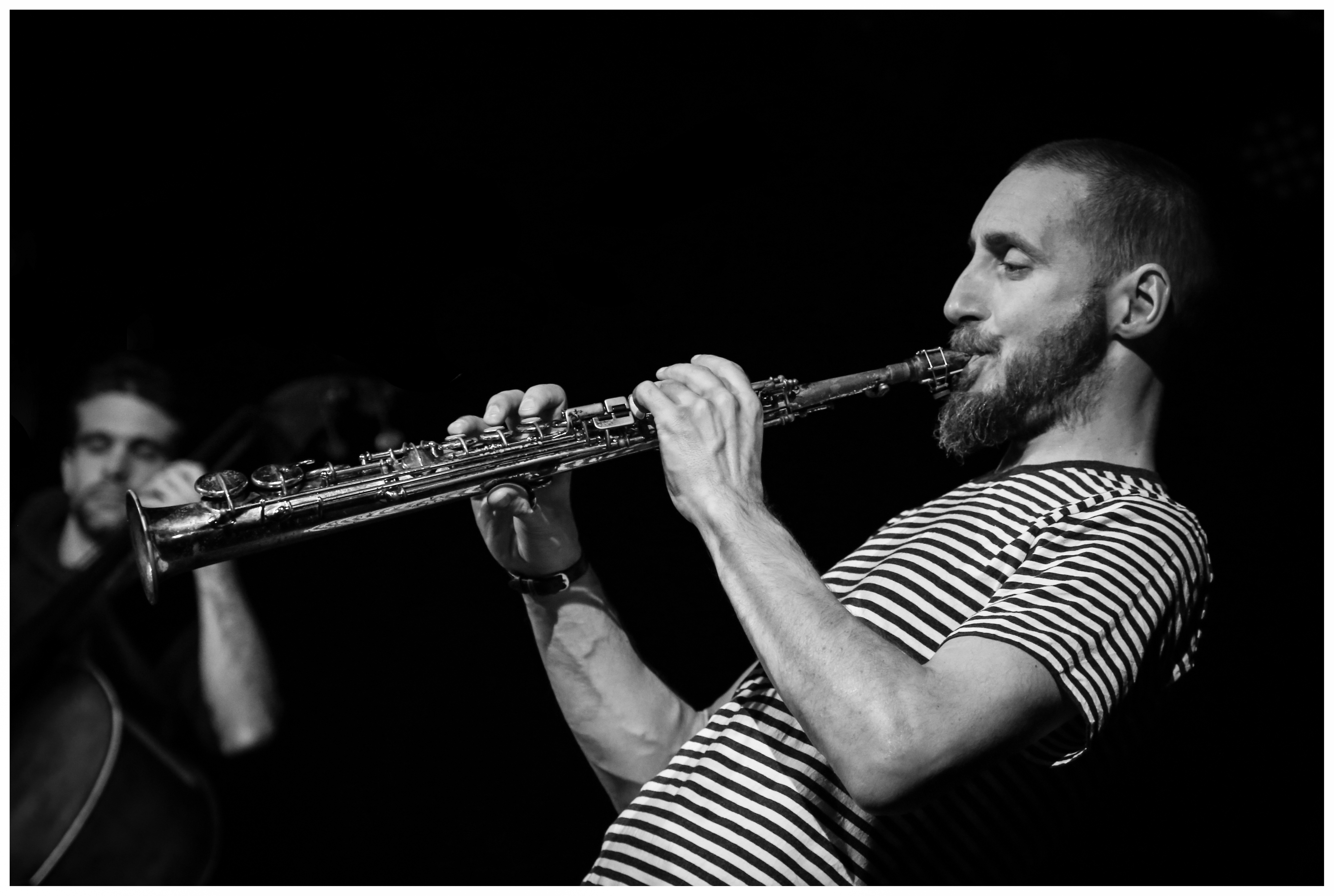 Photographie de Christophe Panzani